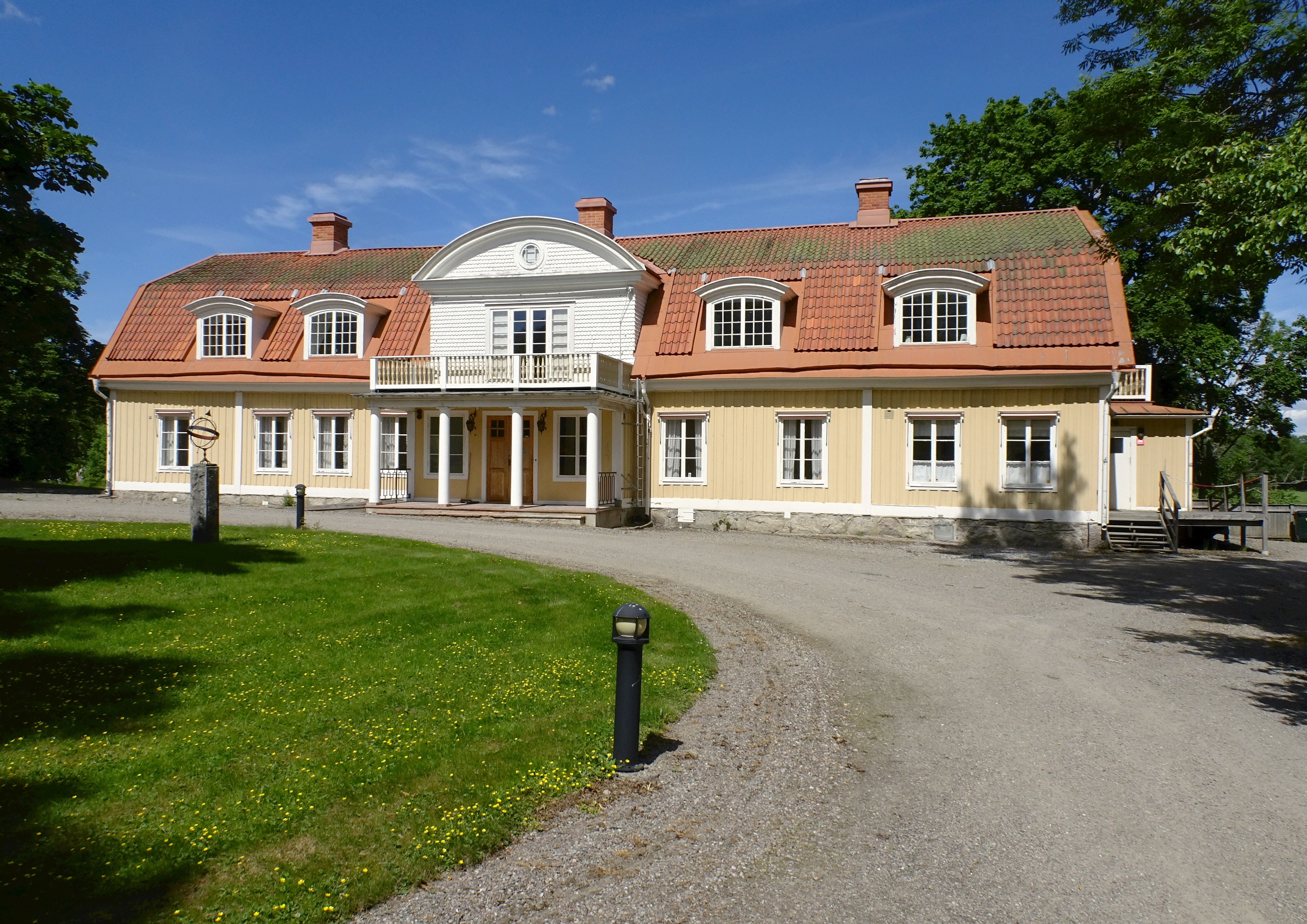 Farsta säteri, Södertälje kommun, huvudbyggnad